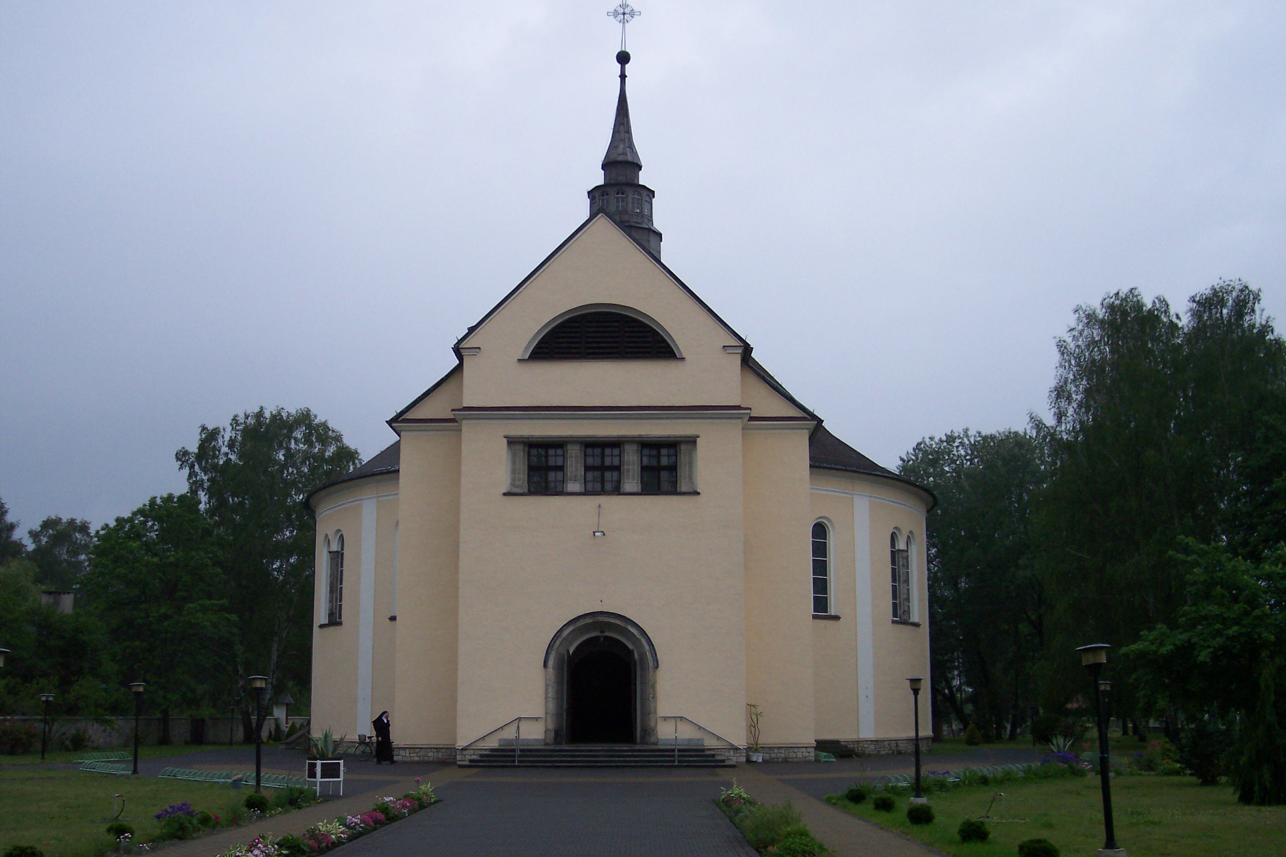 Kolonowskie, ul. Leśna 13 - rzymskokatolicki kościół parafialny pw. Niepokalanego Serca Maryi, 1949-1954